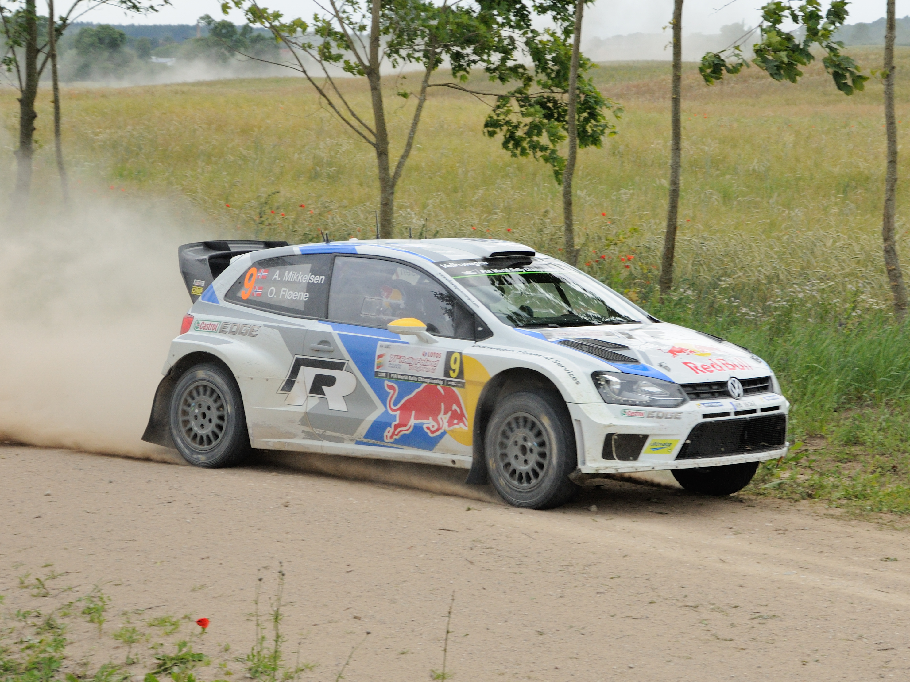 Andreas Mikkelsen podczas Rajdu Polski 2014